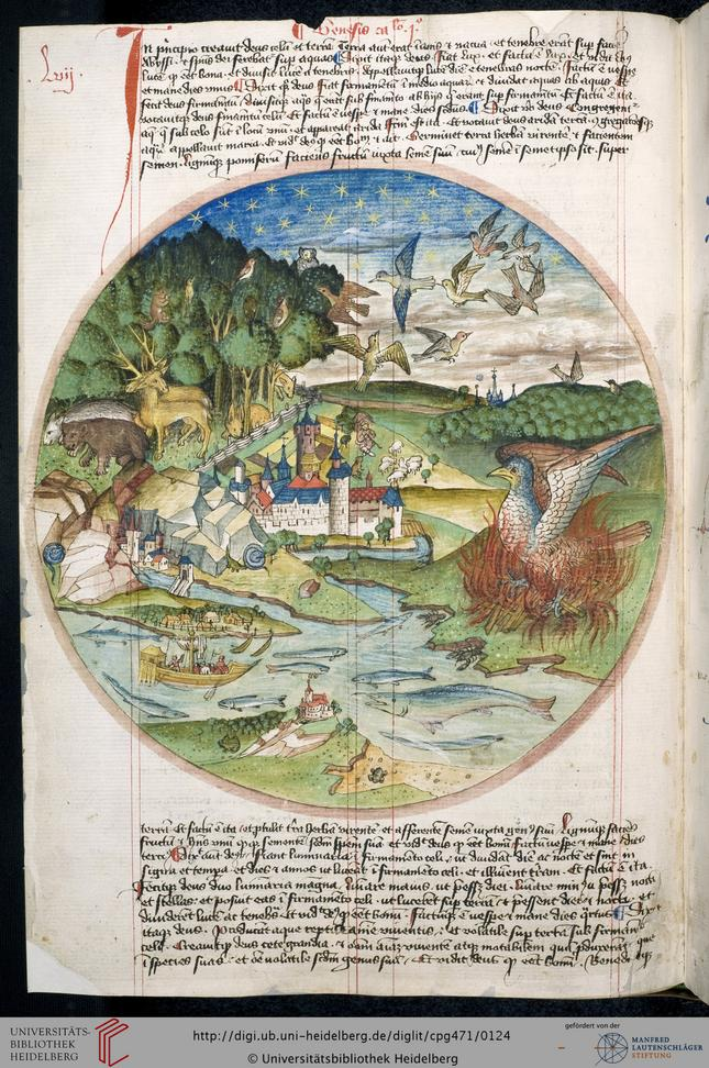 Hugo von Trimberg "Der Renner"